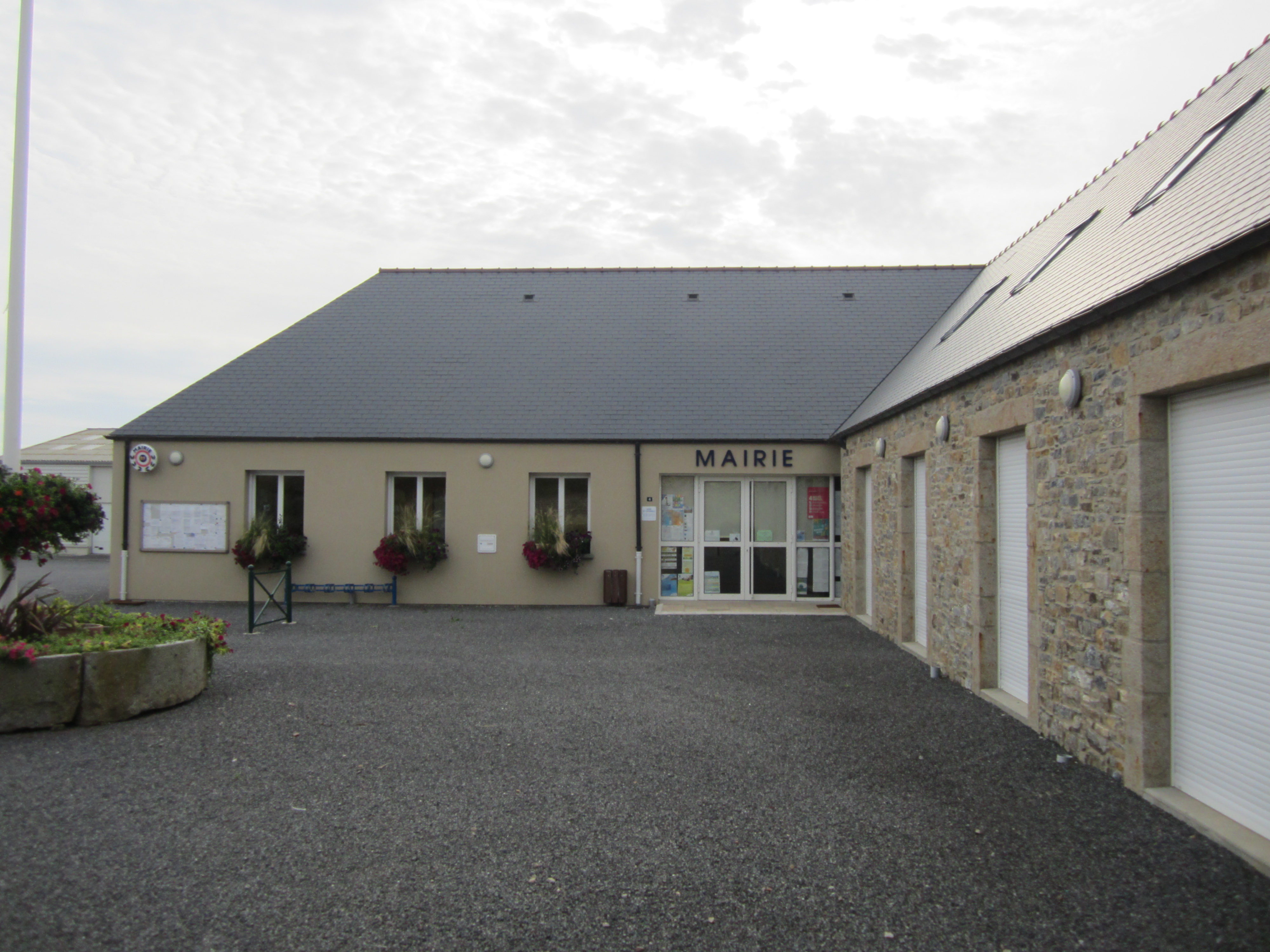 Église Saint-Pierre de Surtainville